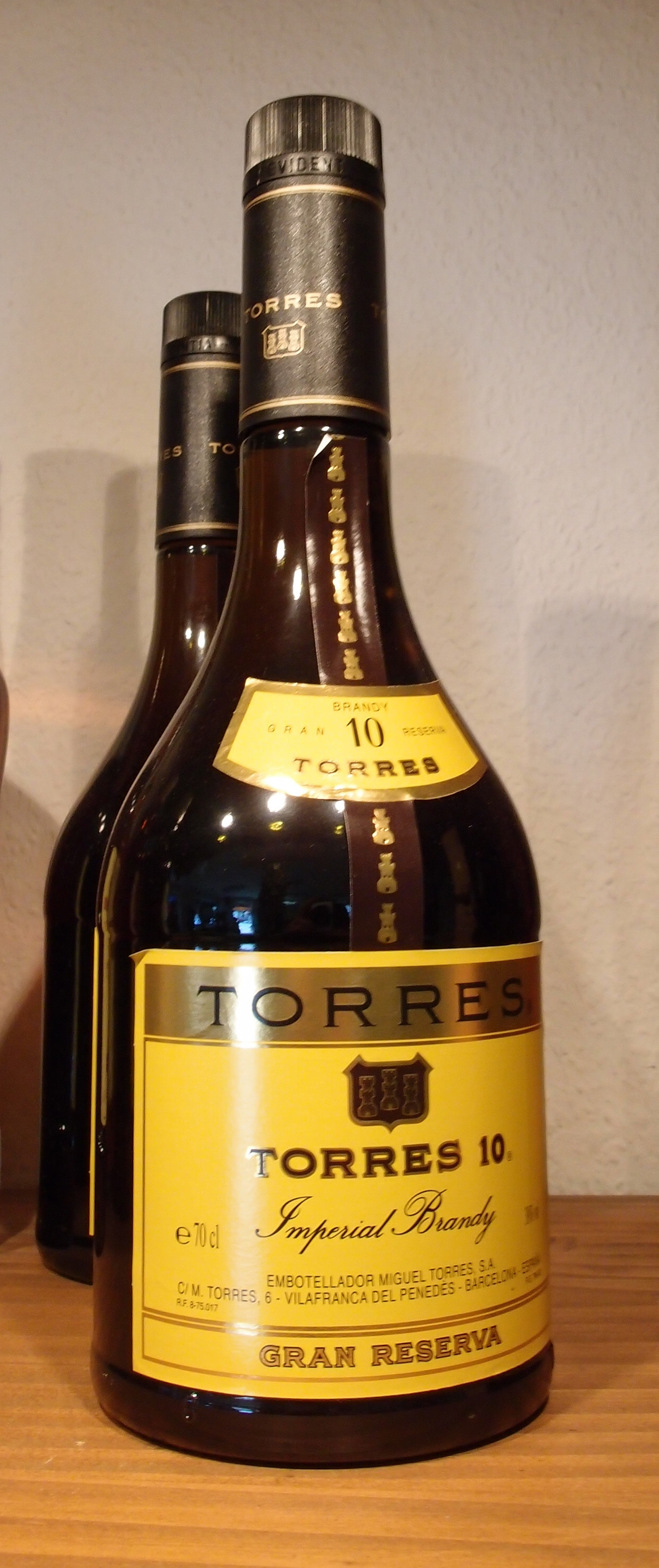 Brandy Torres 10 (Spanien) Datum: 09. Juli 2011 Urheber: M. Pfeiffer alias Benutzer:Gordito1869 Quelle: privates Fotoarchiv des Urhebers